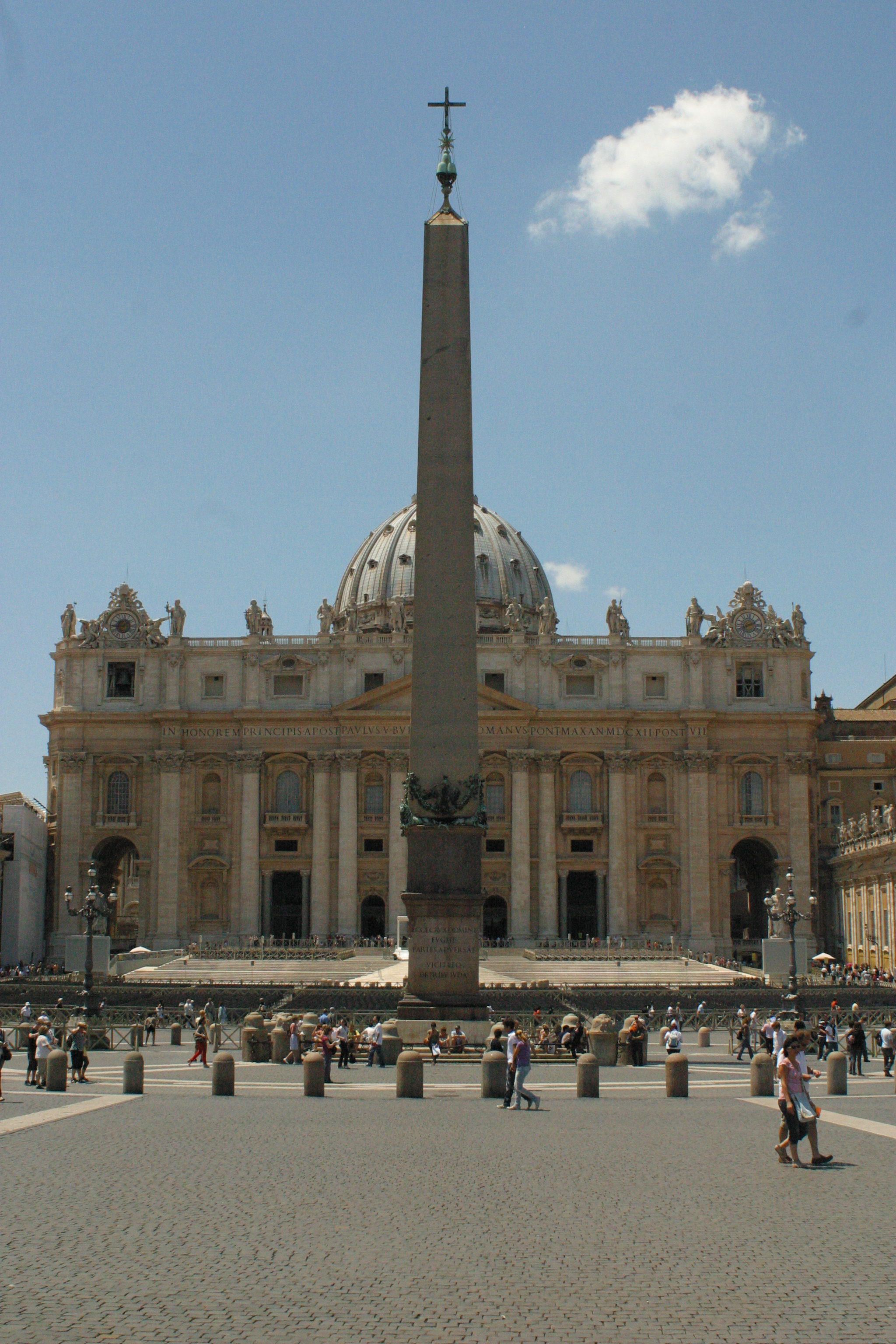 Basilica di San Pietro, città del Vaticano (Roma)